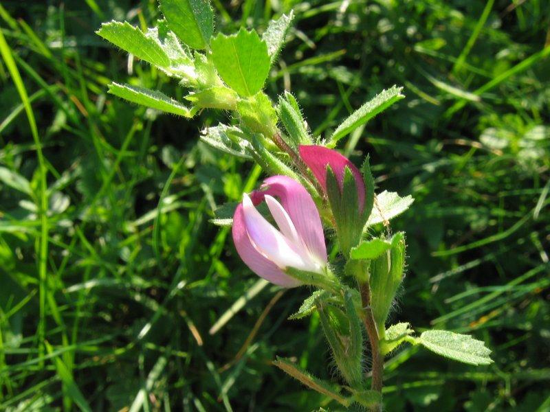 Kriechende Hauhechel (Ononis repens)